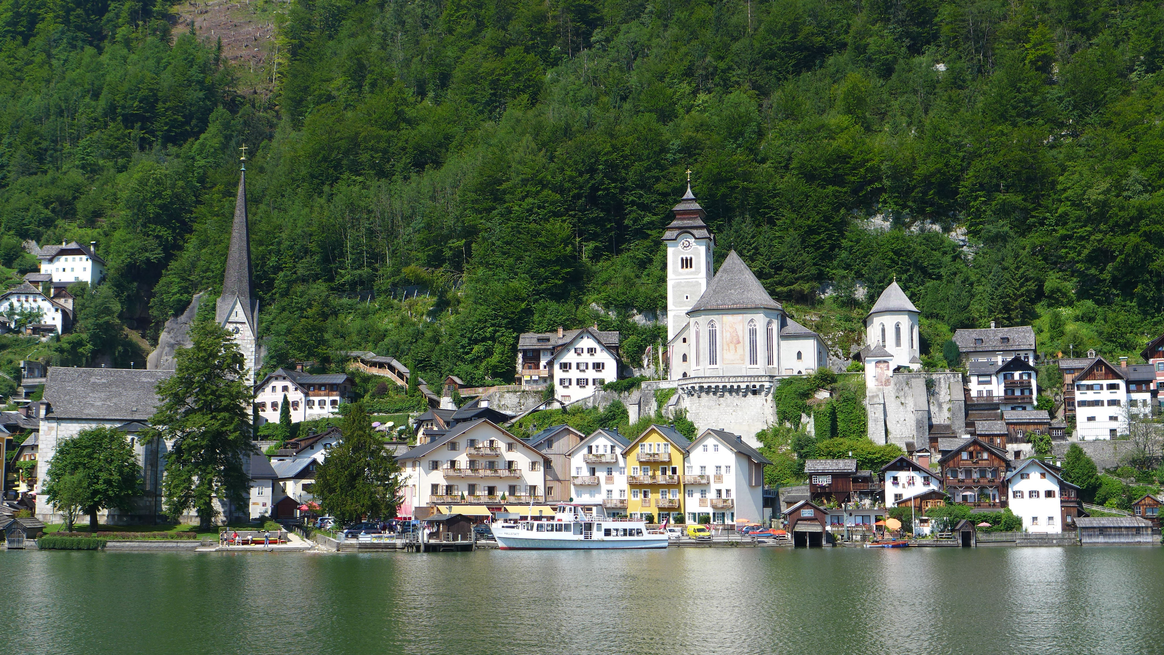 Blick auf Hallstatt (2013)